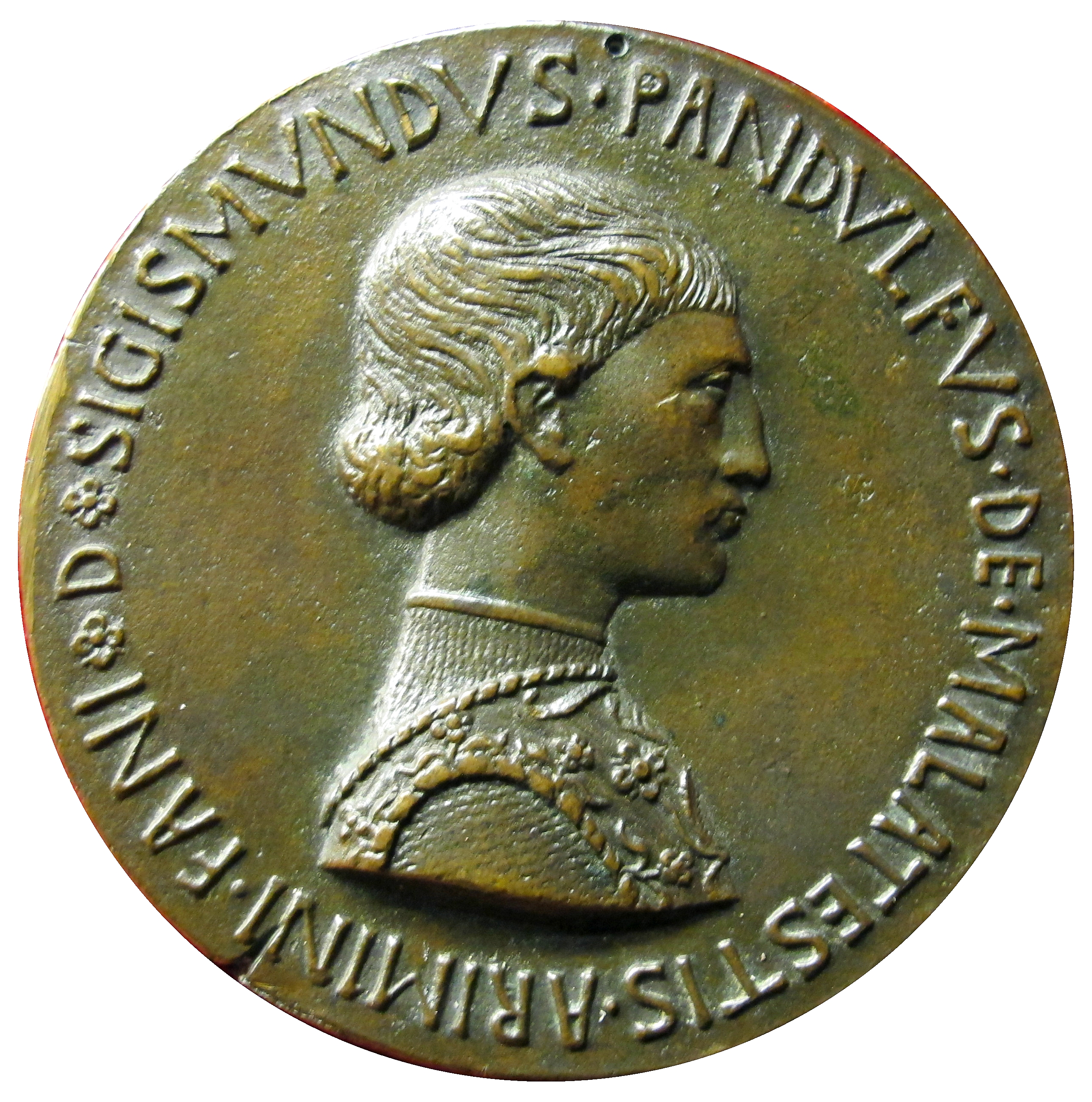 Pisanello, medaglia di sigismondo pandolfo malatesta, recto